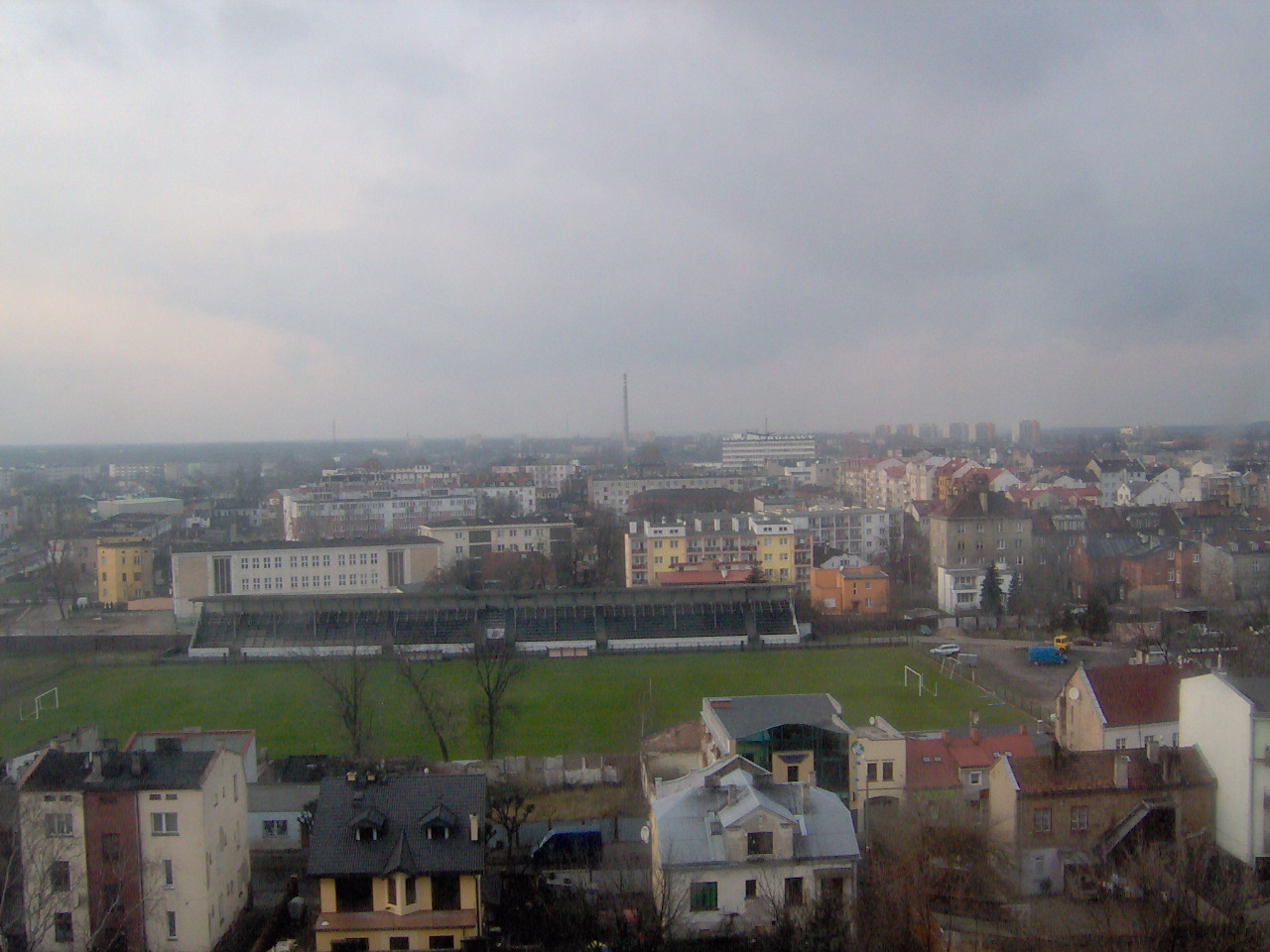 Boisko Wloclavii (2007 r.)